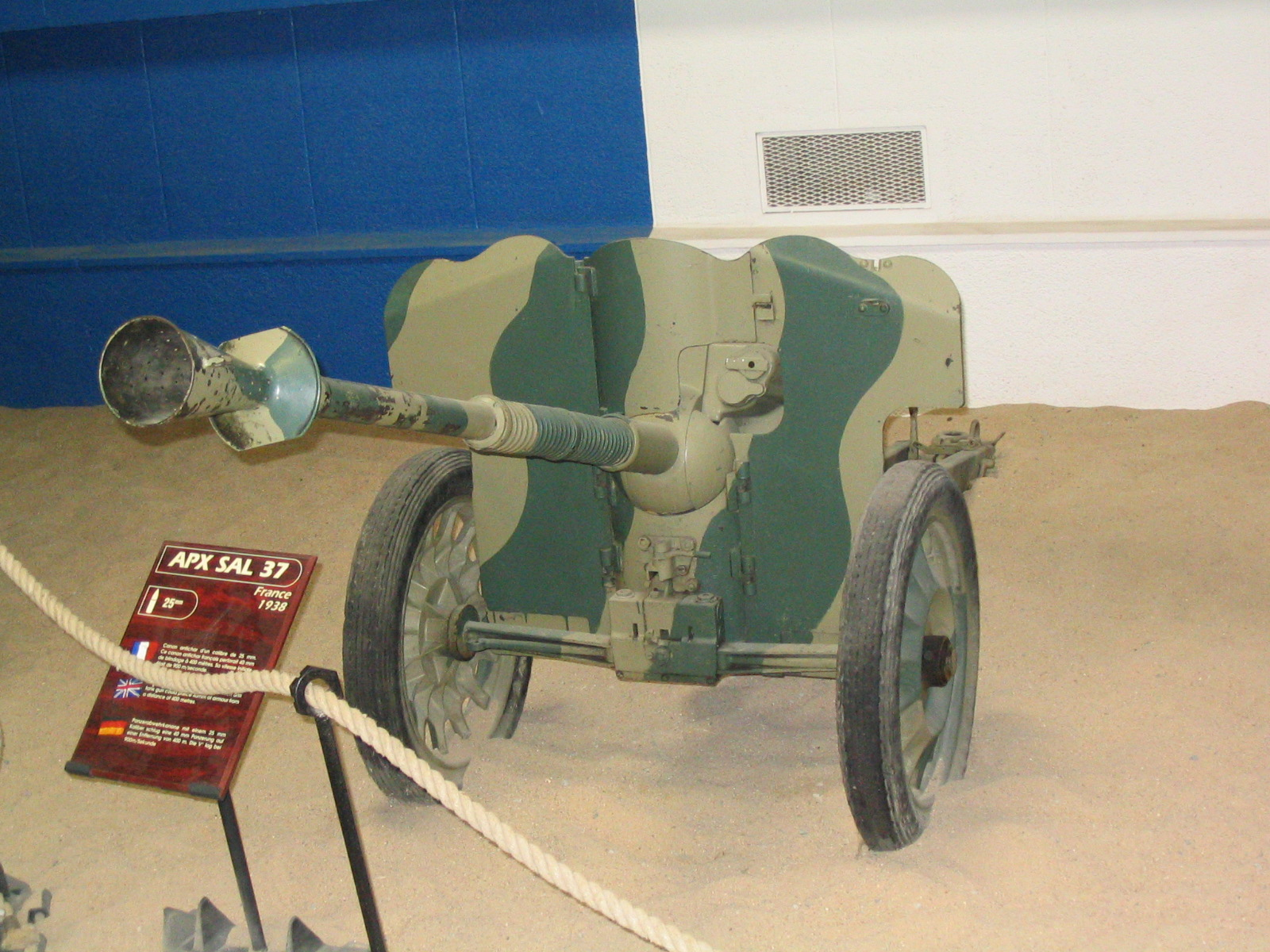 The 25 mm SA mle 1937 antitank gun at Saumur museum